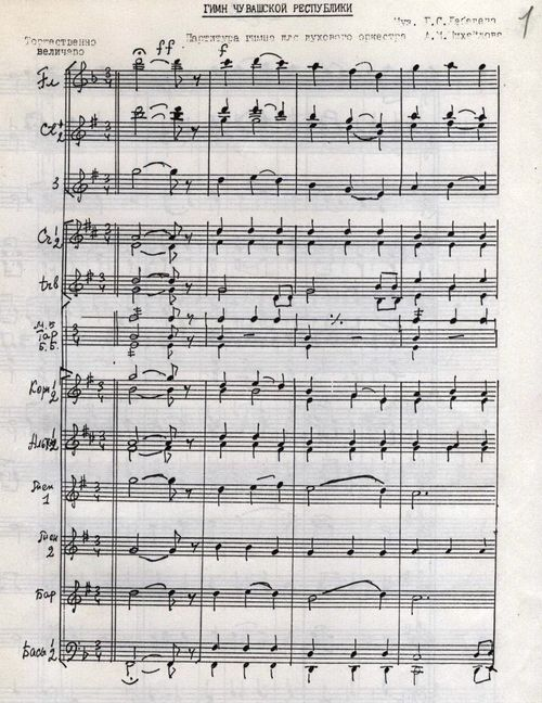 Гимн Чувашской Республики. Партитура гимна для духового оркестра